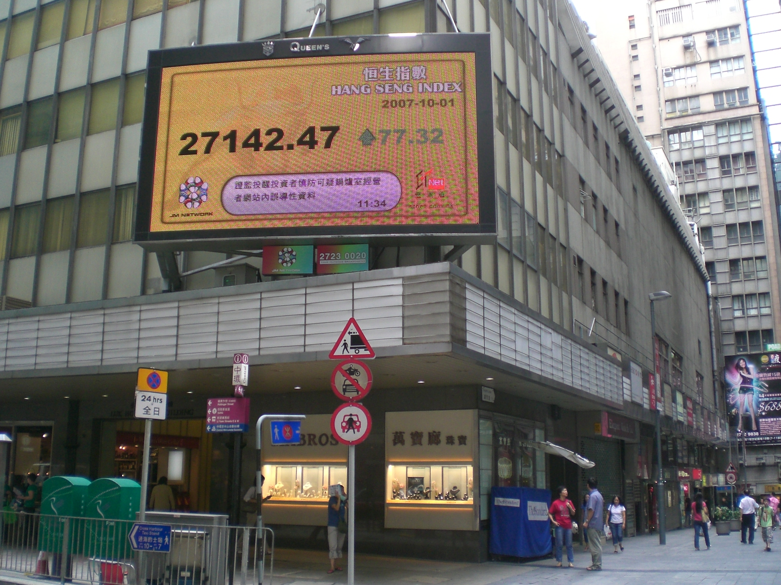 Author= DDMLL 恆生中國企業指數, 陸海通大廈, 戲院里, Luk Hoi Tong Building, 皇后大道中